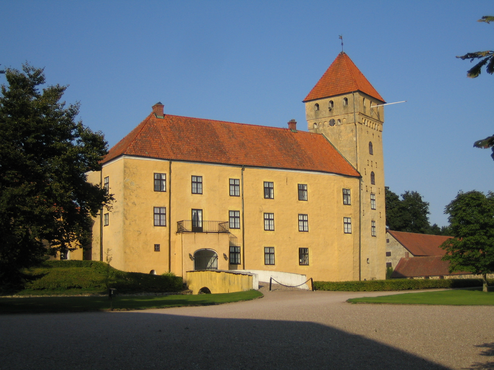 Tosterups slott. Bilden tagen av mig själv 21 augusti 2005.